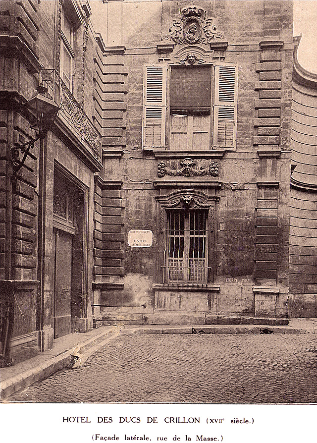 Ancienne Livrée de Pampelune devenue Hôtel des ducs de Crillon